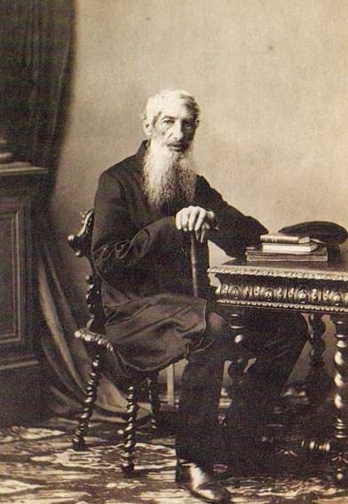 С.П.Трубецкой